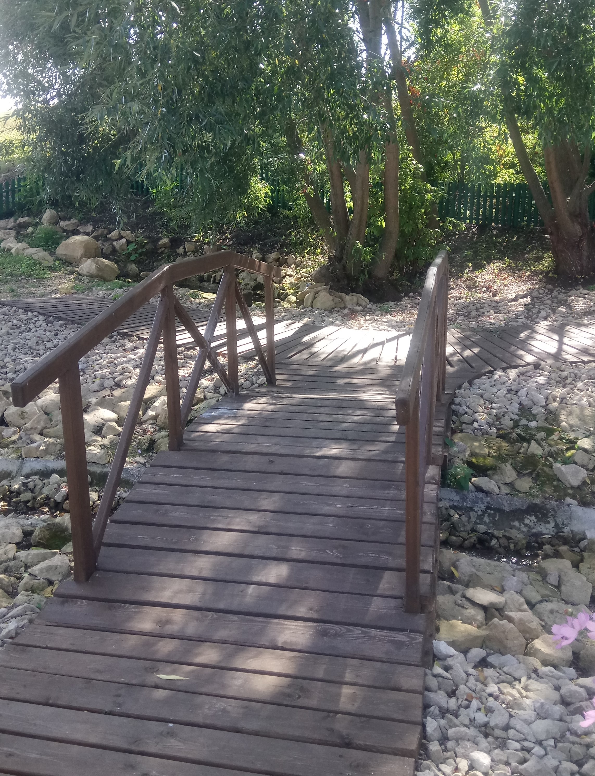 Татарча/tatarça: Чишмәгә менә шул юл алып бара